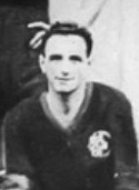 Ercole en La Dominante, con 27 años.